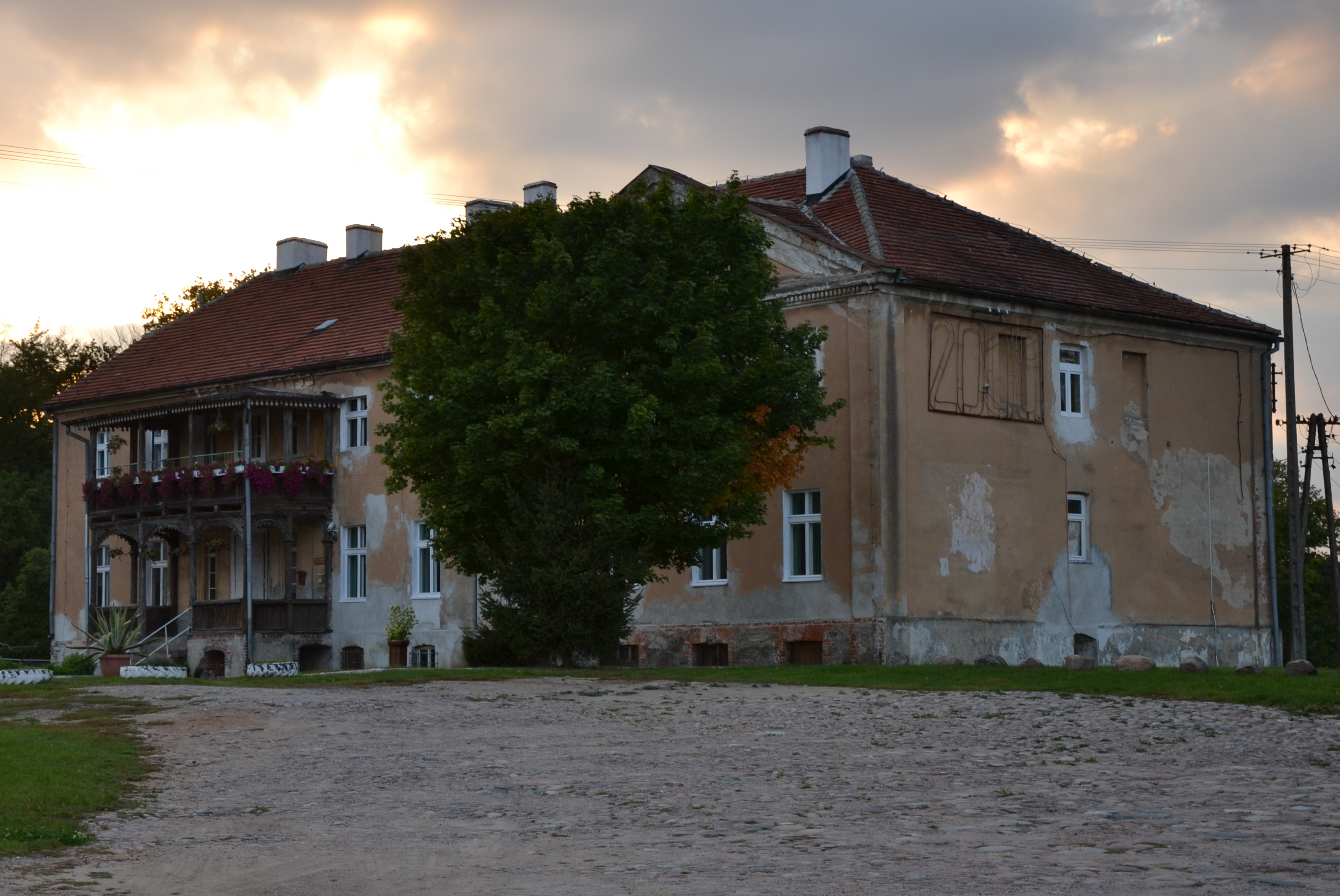 Gogolice - dwór, dziedziniec gospodarczy (zabytek nr 759)